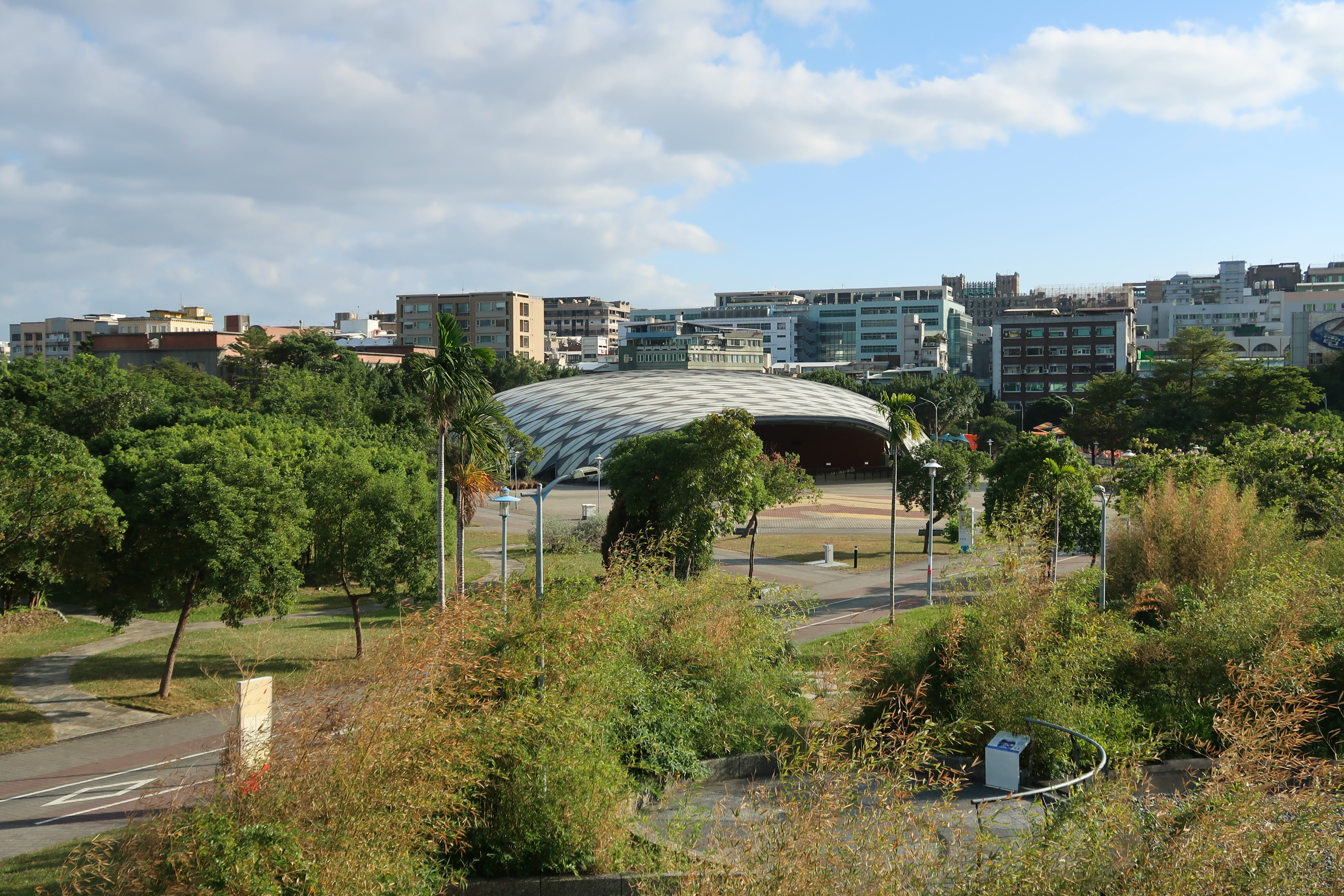 花博舞蝶館